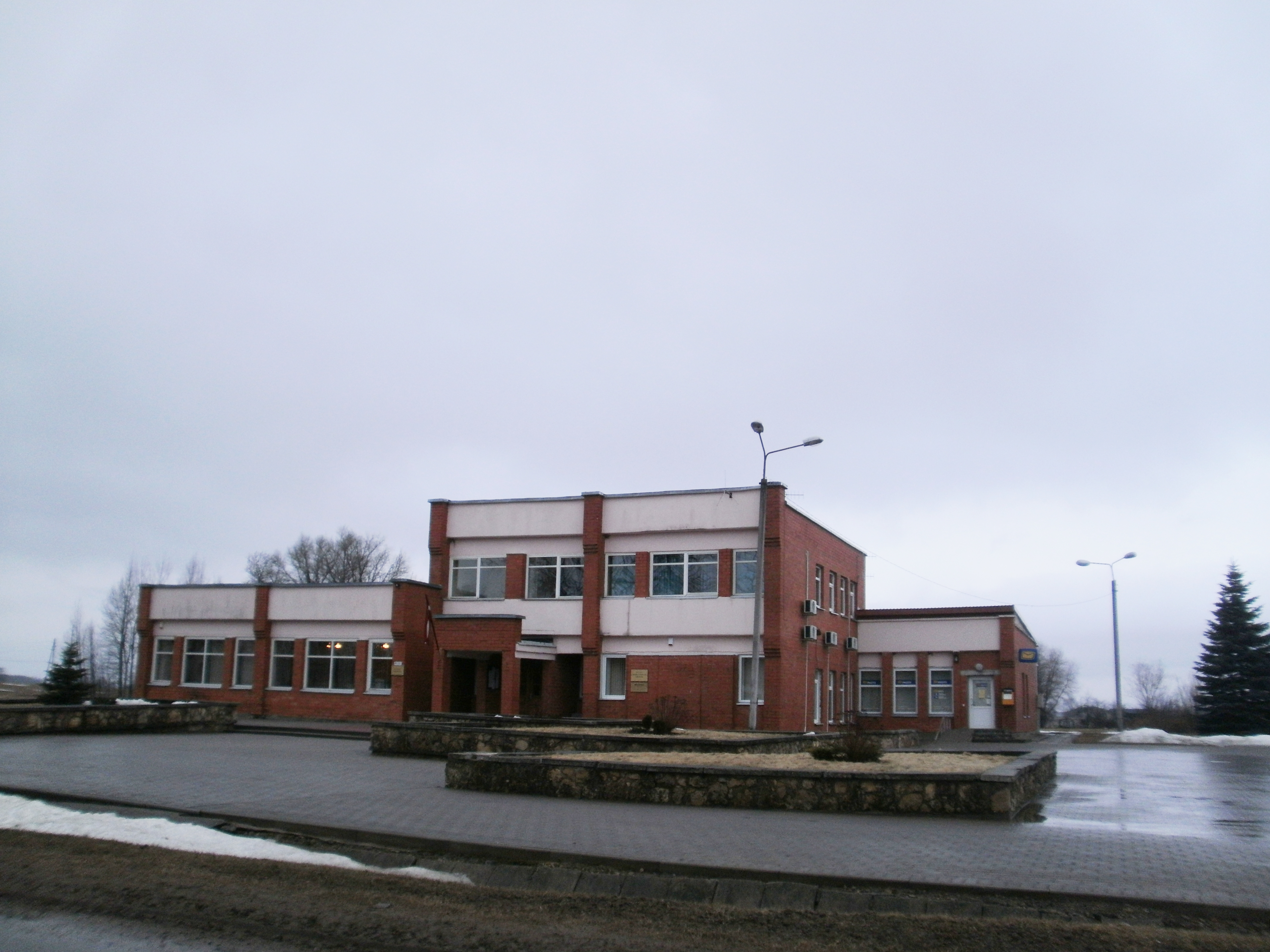 Rudzātu pagasta pārvalde.